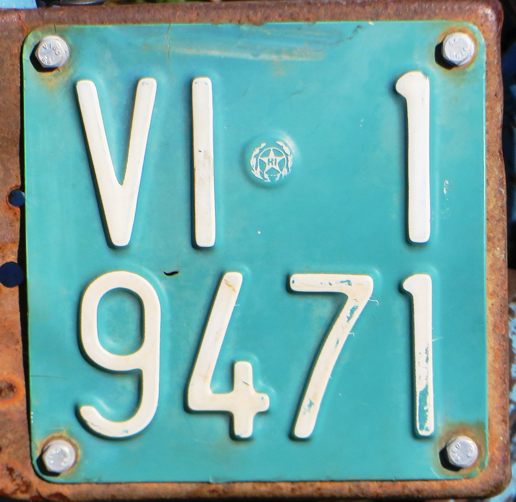 Oud landbouw kenteken plaat voor tractoren